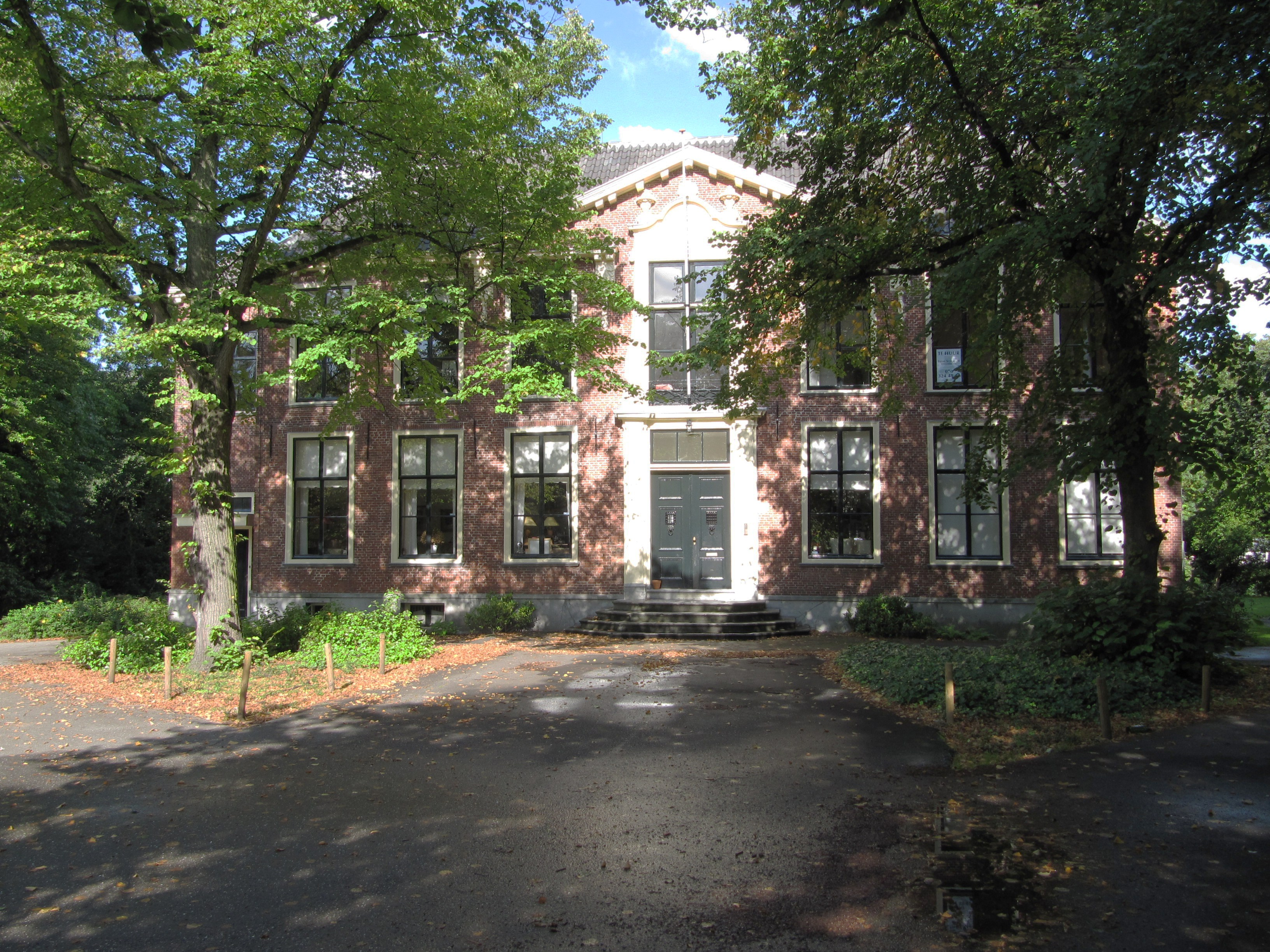 RM20039 Rijswijk - Beetslaan 251.jpg